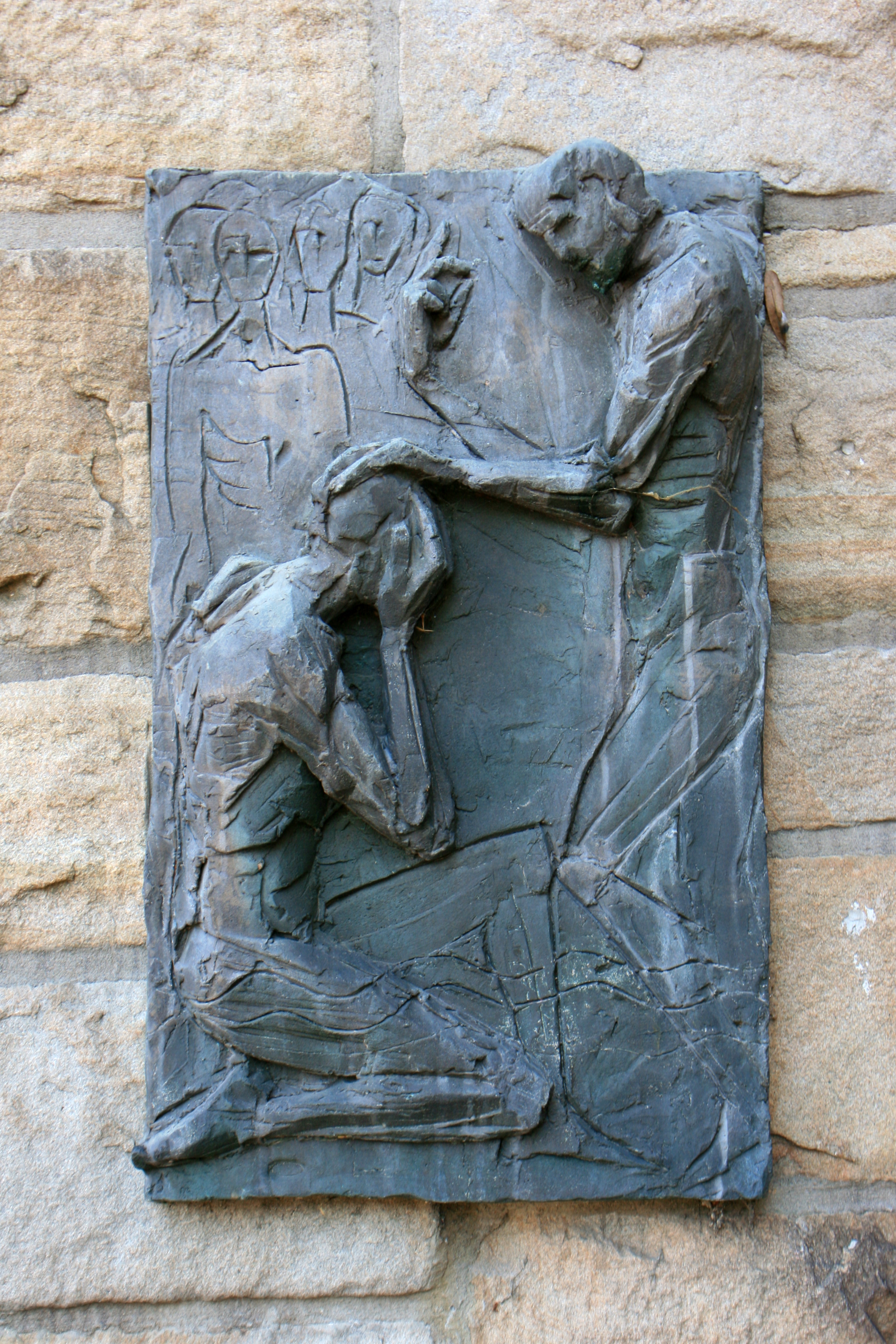 Evangelische Johanneskirche, Richard-Wagner-Straße in Herne-Eickel